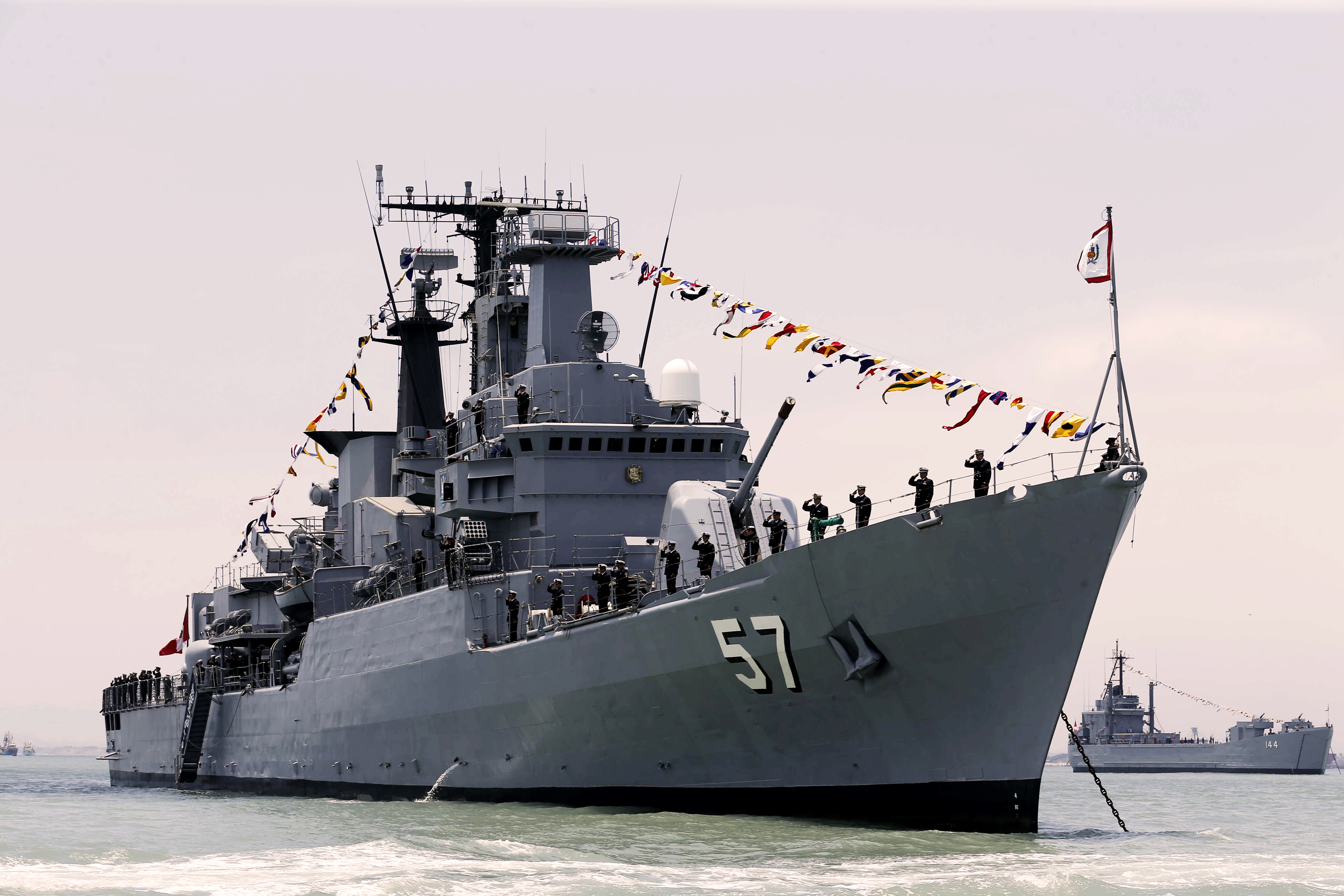 La fregata peruviana Bolognesi ex italiana Perseo nel corso della parata aeronavale in occasione del 194 anniversario dell'indipendenza peruviana